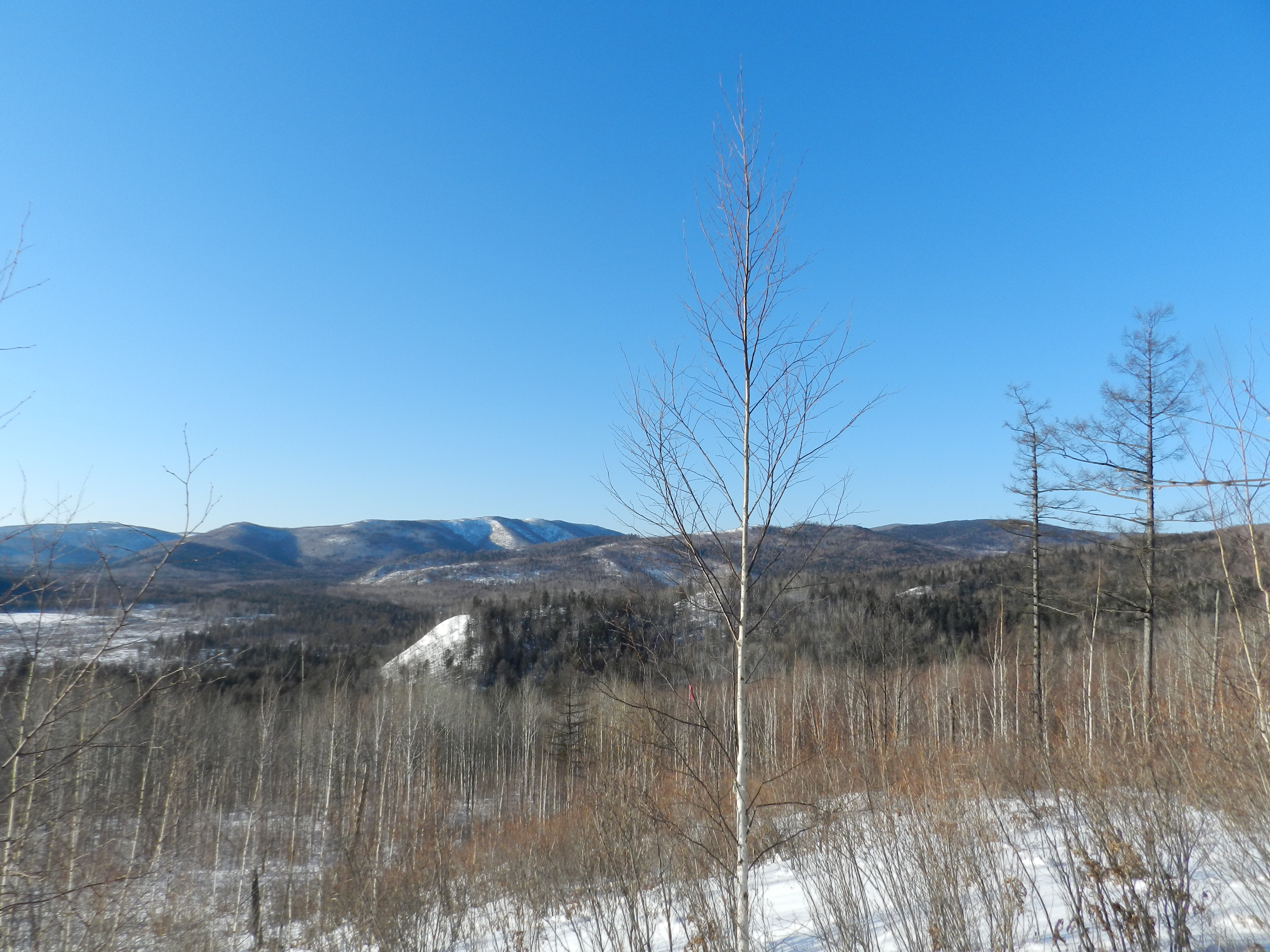 Кульдур: Облученский район, This image is related to the protected area of Russia number 7910016